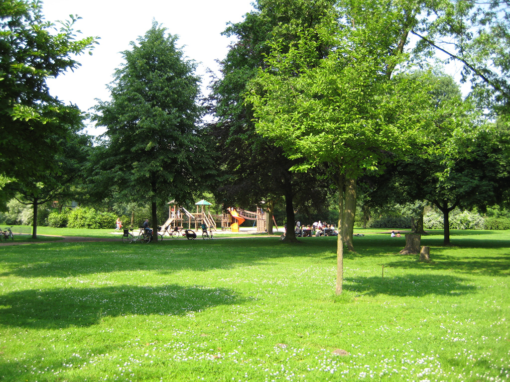 Große Spielanlage im Burgpark Hüls